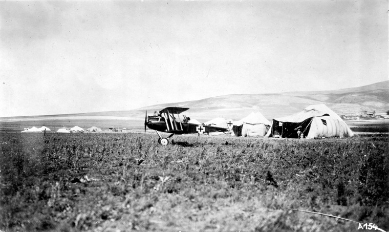 מטוס של הטייסת הבאווארית 304 במלחמת העולם הראשונה במנחת ליד עפולה, ברקע מבני הקואופרציה מרחביה 1917 - עפולה/ציוני